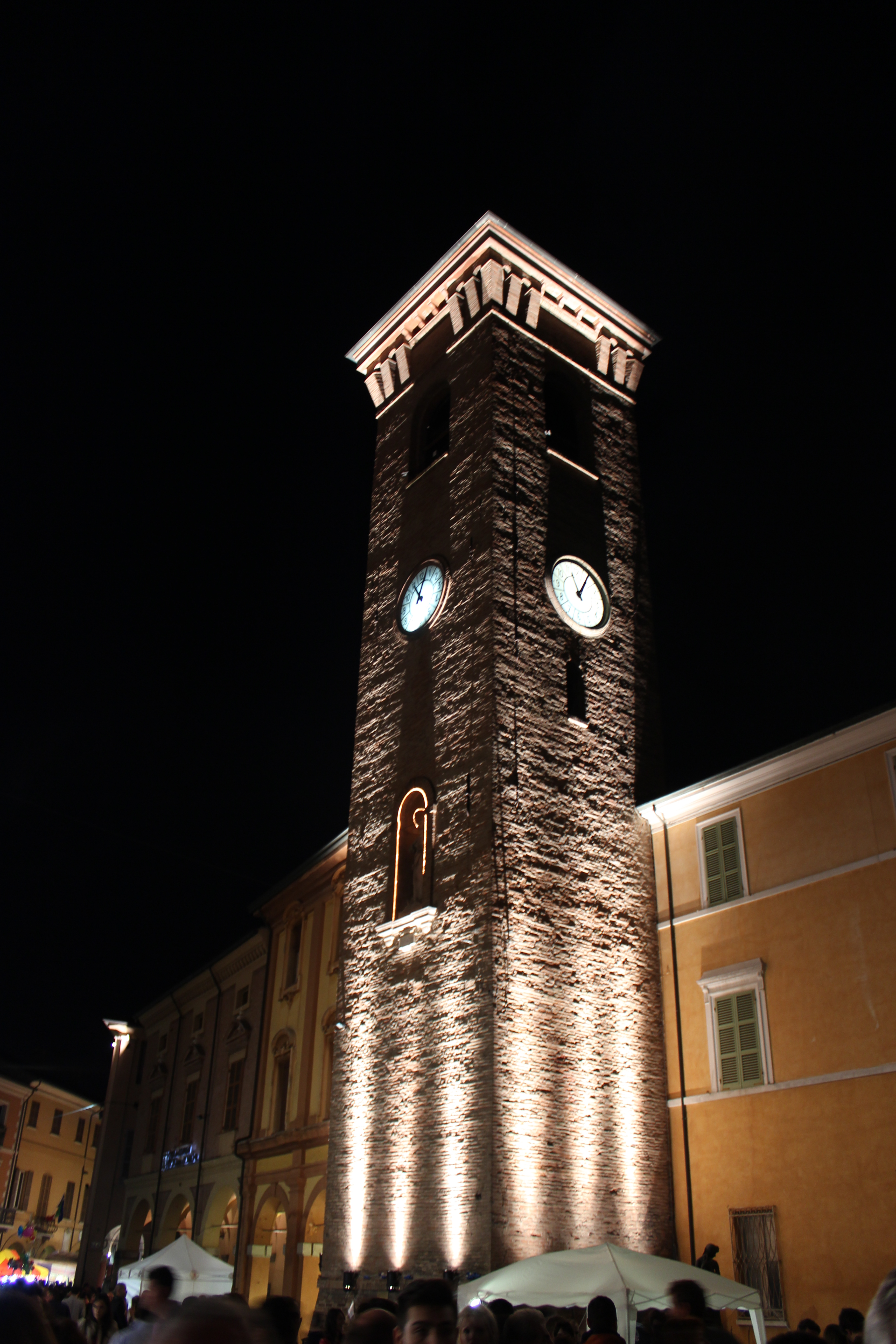 Torre civica - MiBAC This is a photo of a monument which is part of cultural heritage of Italy.